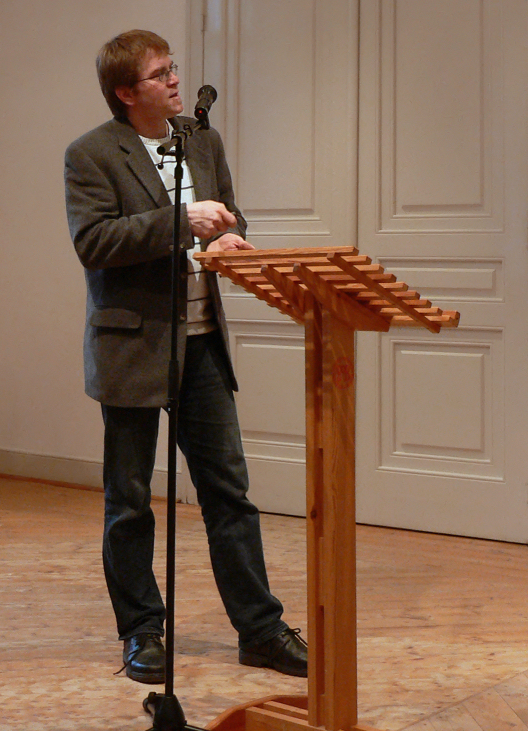 Jens Berthold beim Vortrag zum jährlichen Treffen für die ehrenamtlichen Archäologen und archäologisch Interessierte in Nienburg